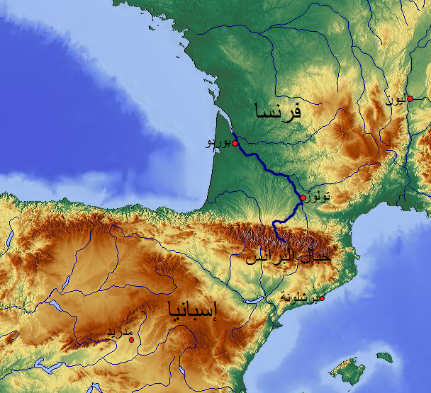 مسار نهر الجارون